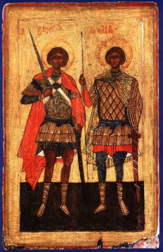 Святые Флор и Лавр в образе воинов Конец 15 века. Центральная Россия Дерево, левкас, темпера. 70,8х45,2 см. Икона является памятником древнерусской живописи второй половины XV века. Ее стиль отражает как новгородские, так и московские традиции Иконография св. Флора и Лавра (римских каменщиков) в воинском облачении - уникальна. Икона представляет художественную и музейную ценность.